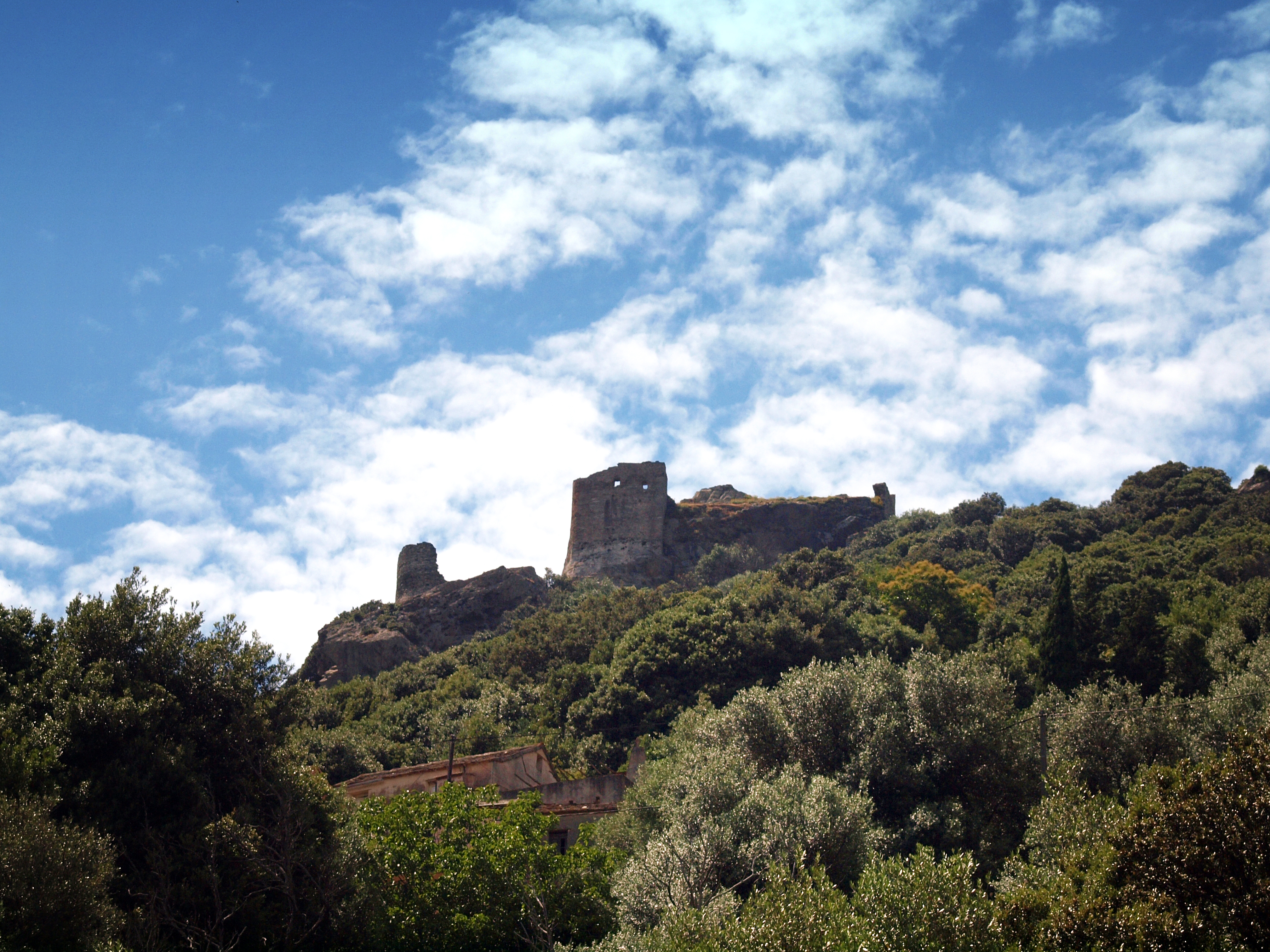 Rogliano (Corse) - Ruines du Castelacciu San Colombanu de la famille Da Mare